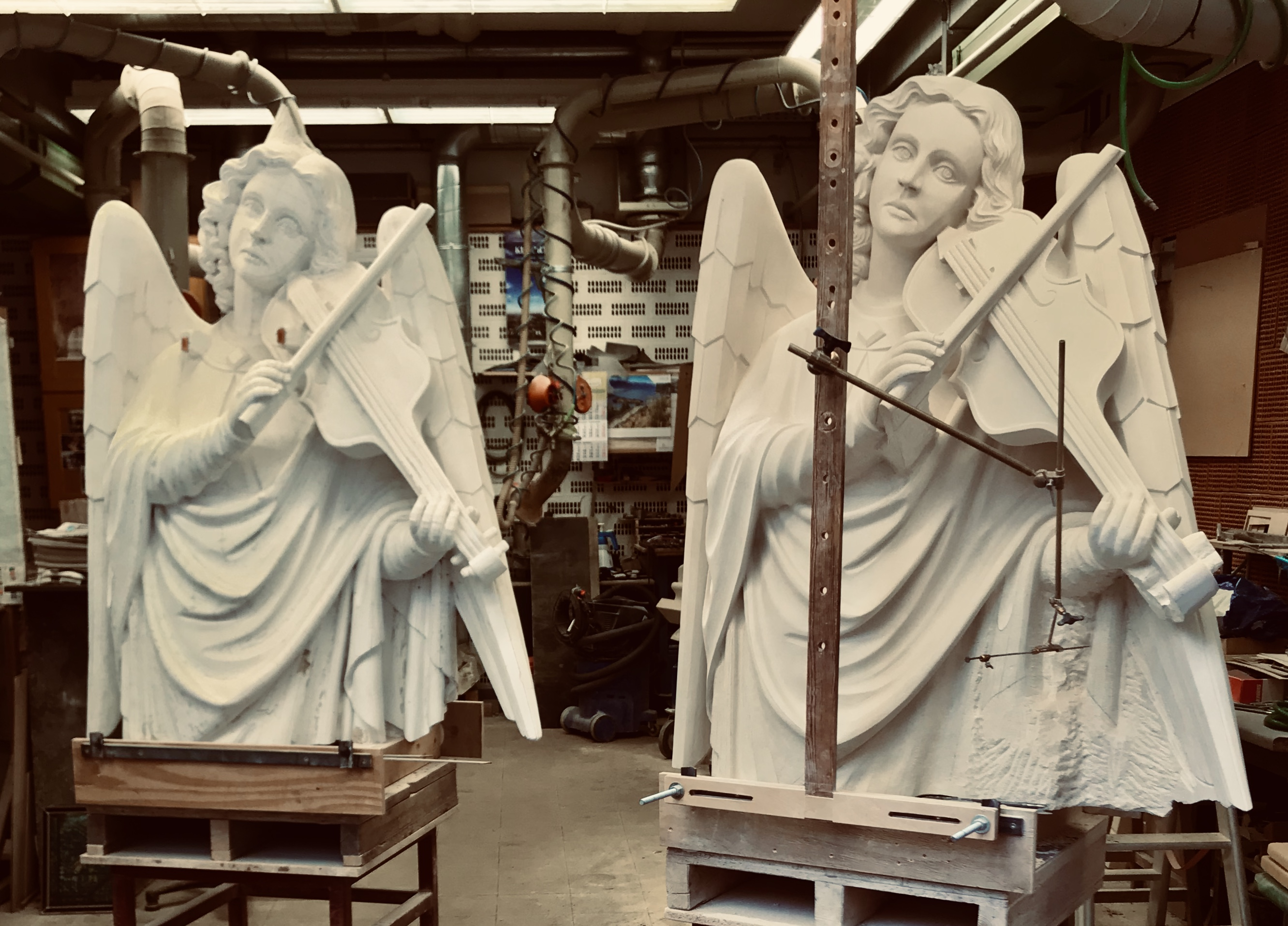 Dombauhütte Köln: Der Steinbildhauer formt eine Statue in Gips. Mit Hilfe des Punktiergerätes wird dieses Figur vom Steinmetz in Werkstein übertragen.